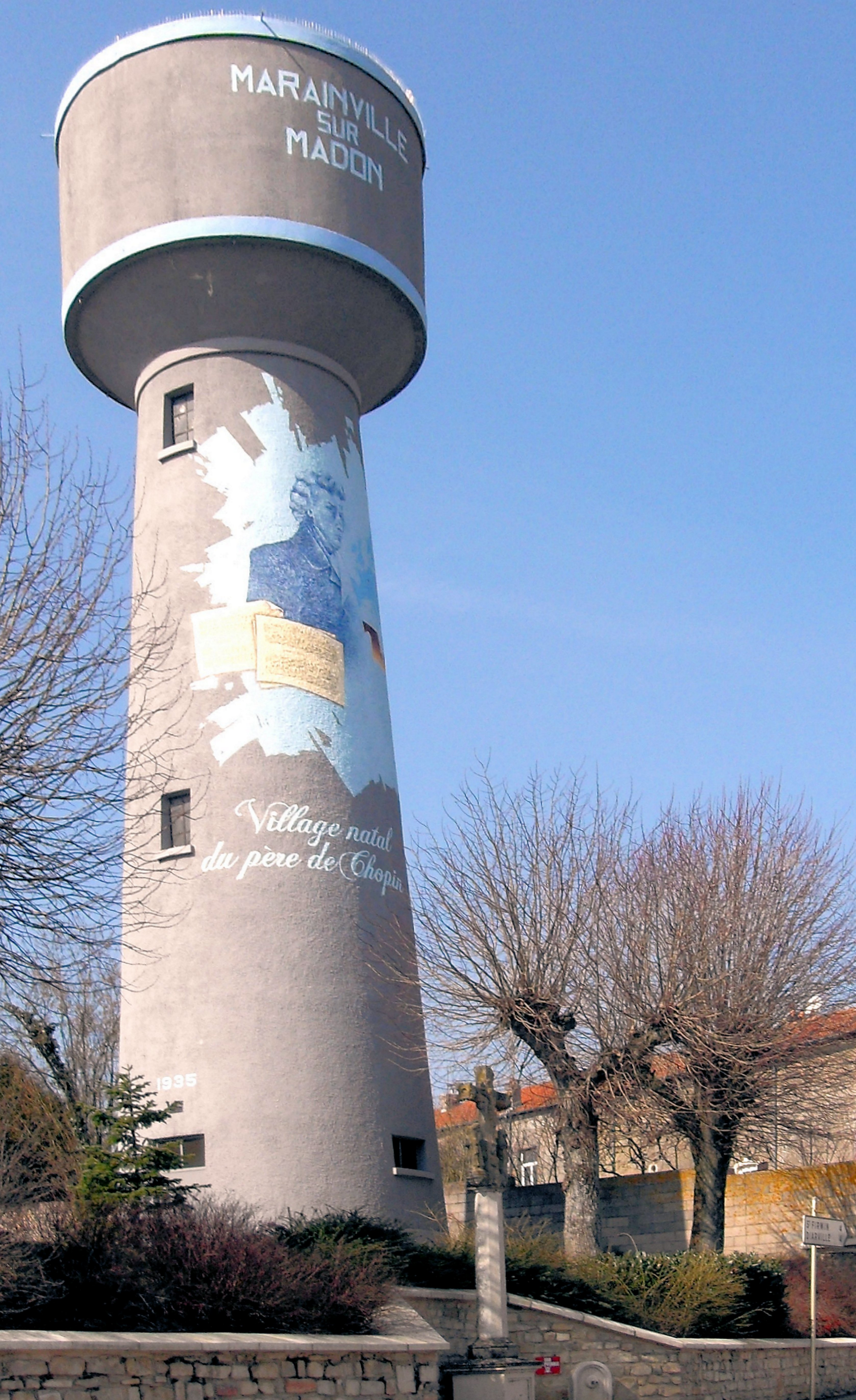 Le château d'eau de Marainville-sur-Madon